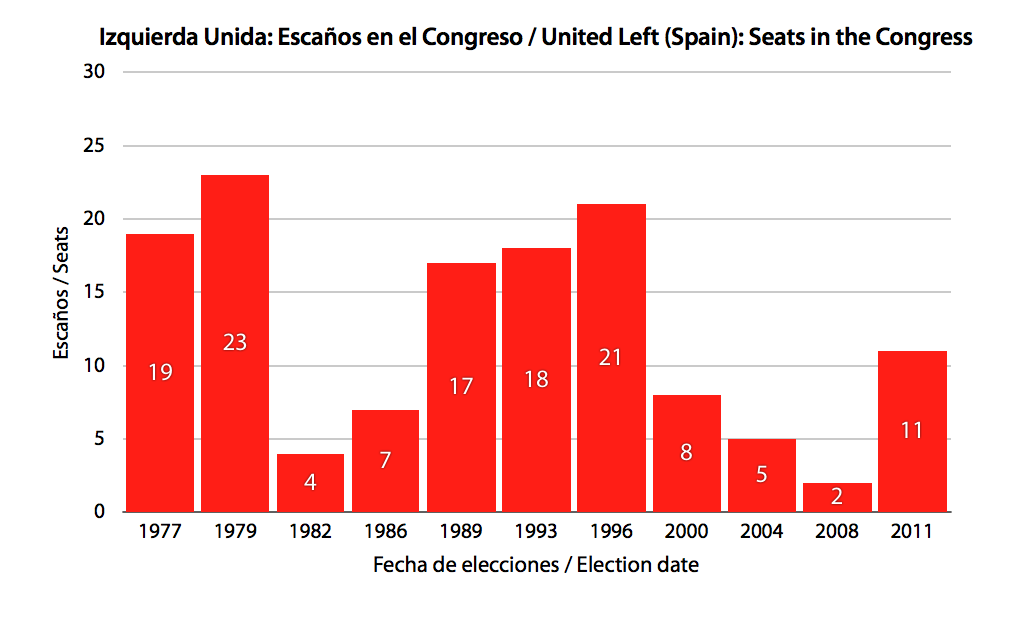 Gráfico sobre la evolución de Izquierda Unida en las elecciones generales españolas. (1977-2004) En las elecciones de 1977, 1979 y 1982 son los escaños del Partido Comunista. A partir de 1986 la formación se unió a otros partidos y adoptó el nombre de Izquierda Unida. Autor: Trabajo propio.